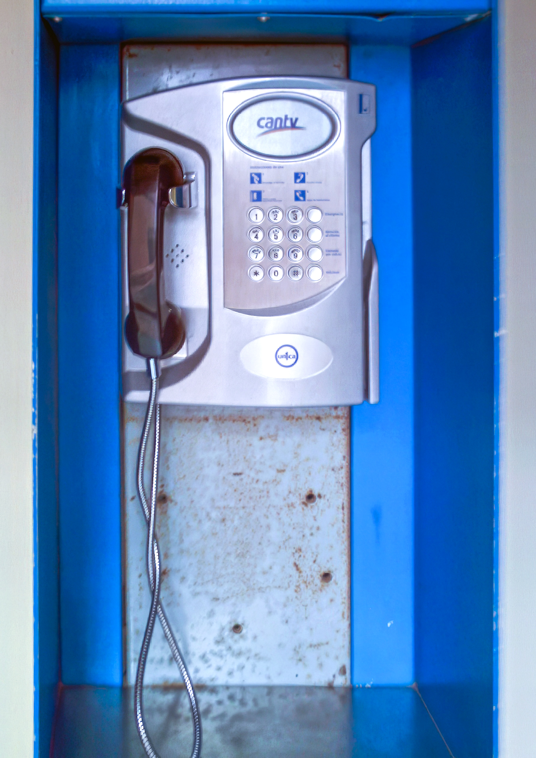 Telefono Tarjetero de CANTV, Margarita, Nueva Esparta, Venezuela